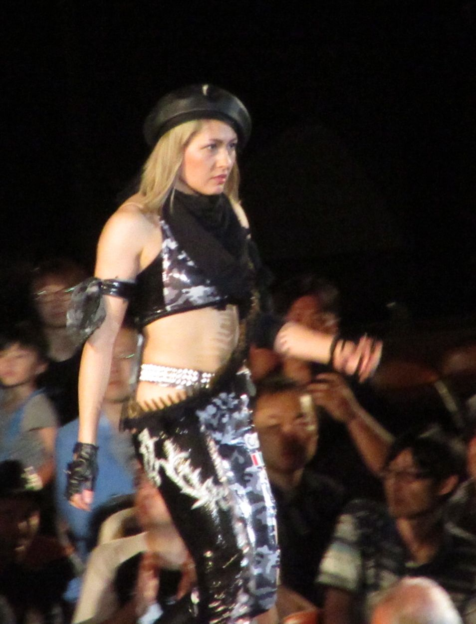 2018年8月26日